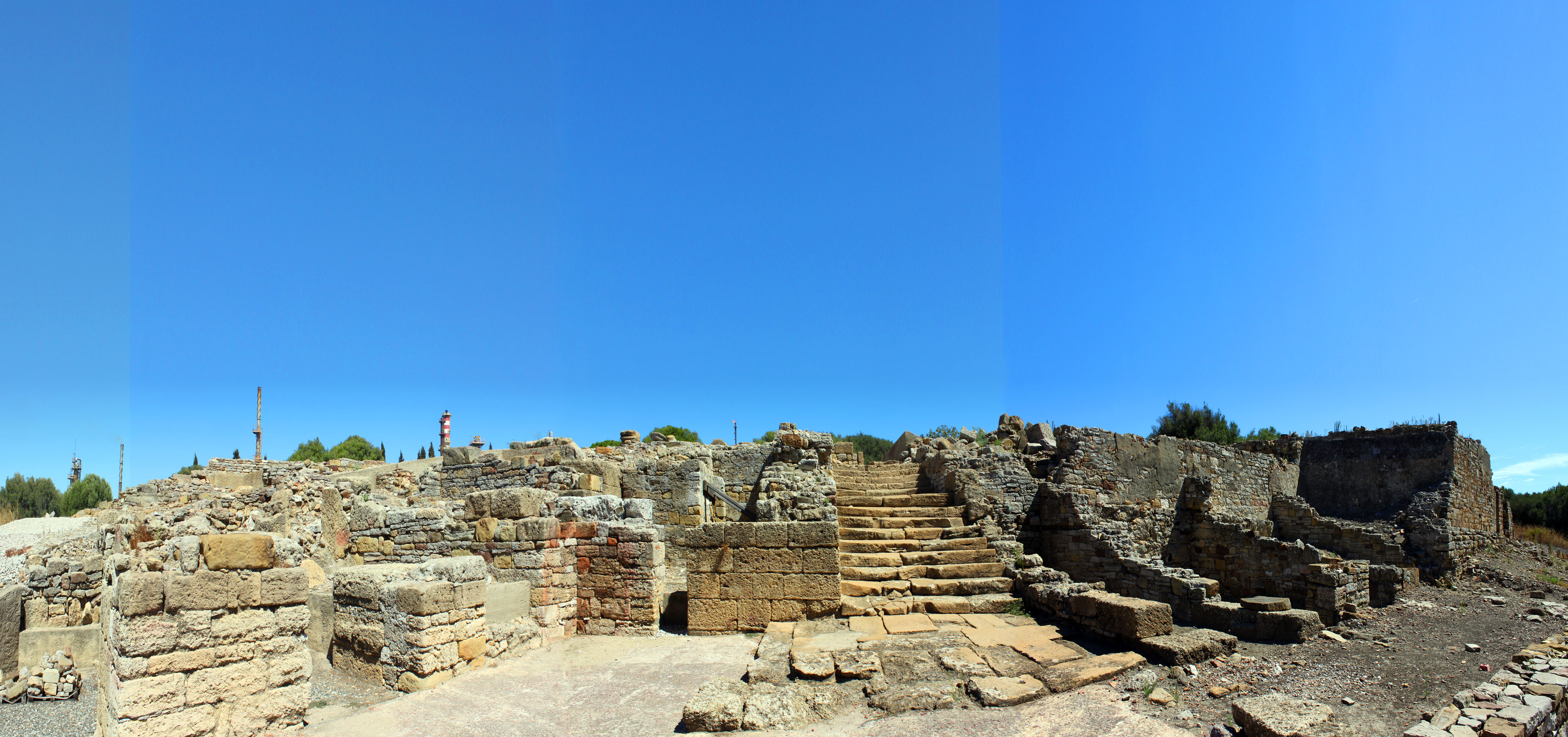 Estructuras visibles del Foro del yacimiento romano de Carteia. San Roque, Andalucía, España.